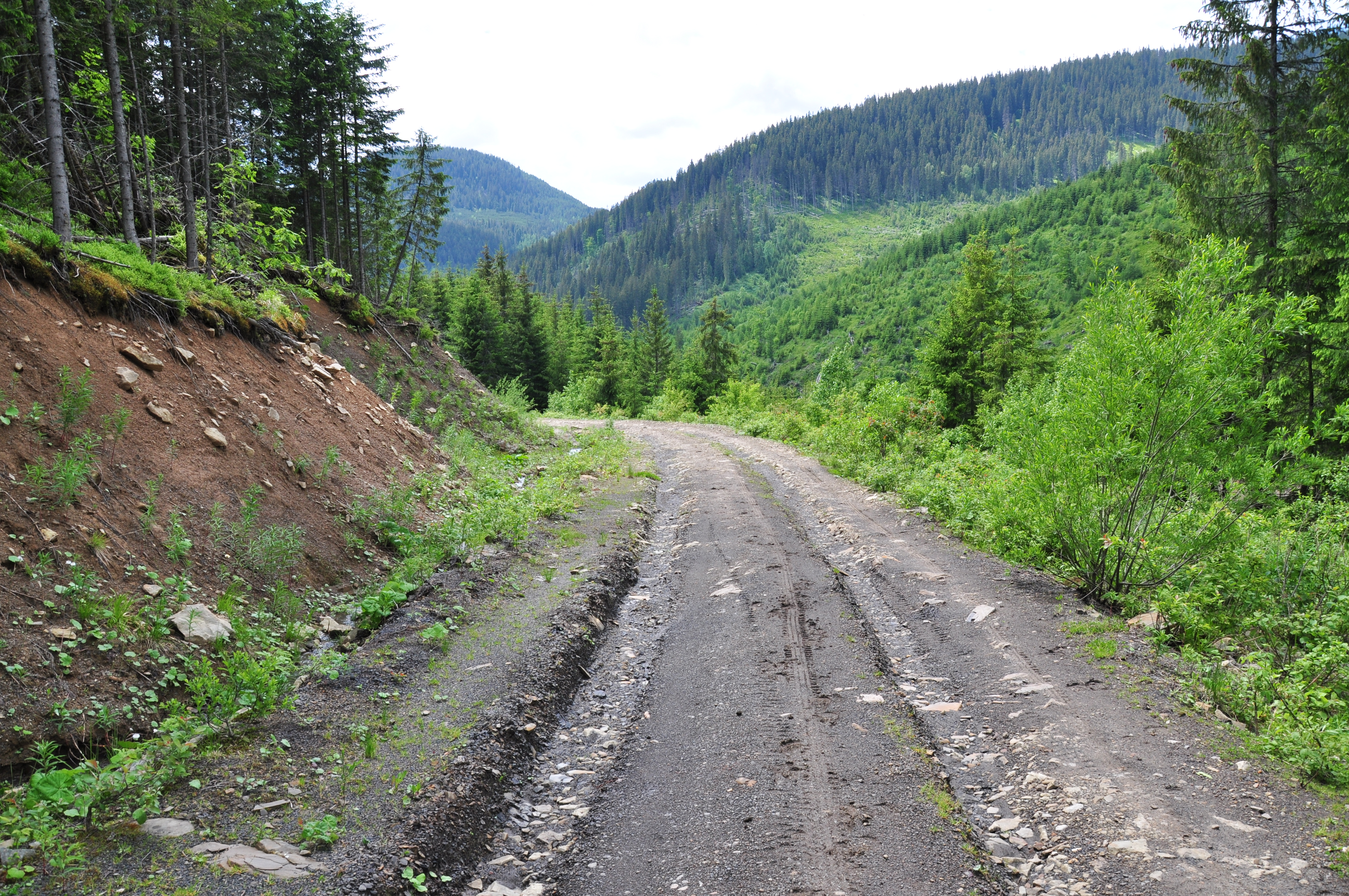 Вигляд на г. Ґорґан (лівіше вдалині)